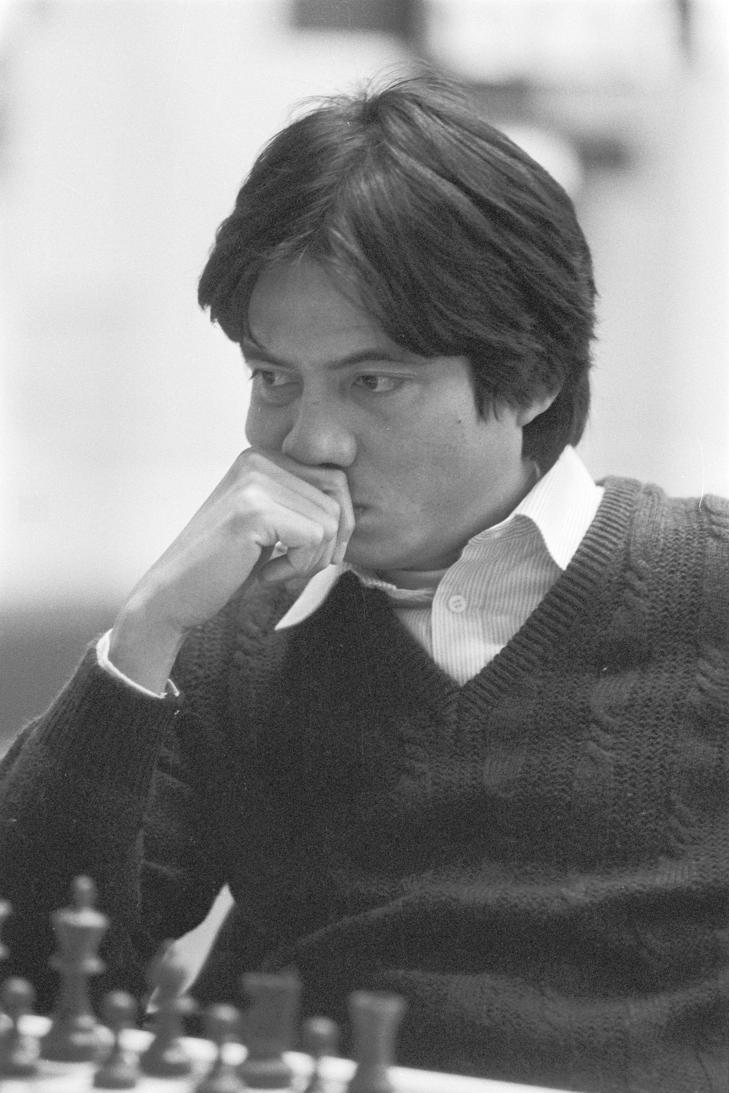 Collectie / Archief : Fotocollectie Anefo Reportage / Serie : [ onbekend ] Beschrijving : Hoogovenschaaktoernooi, 1e ronde; Cugerrio Torre / Documentnummer: 932-8312/ Fotograaf: ANEFO / Bogaerts / Bestelnummer fotograaf: / Datum : 13 januari 1984 Trefwoorden : schaken Instellingsnaam : Hoogovenschaaktournooi Fotograaf : Bogaerts, Rob / Anefo Auteursrechthebbende : Nationaal Archief Materiaalsoort : Negatief (zwart/wit) Nummer archiefinventaris : bekijk toegang 2.24.01.05 Bestanddeelnummer : 932-8312